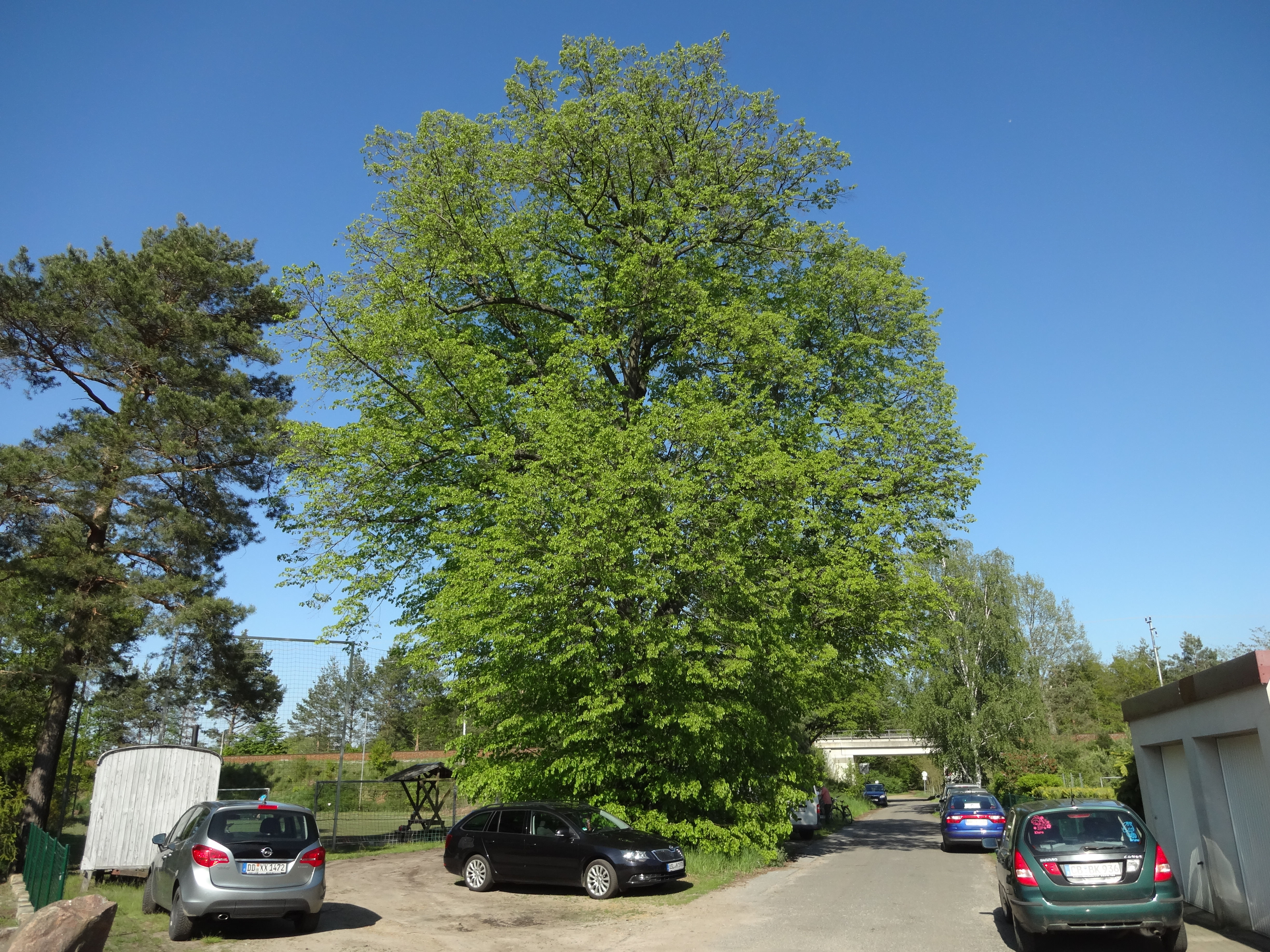 Naturdenkmal Linde am Sportplatz Peickwitz